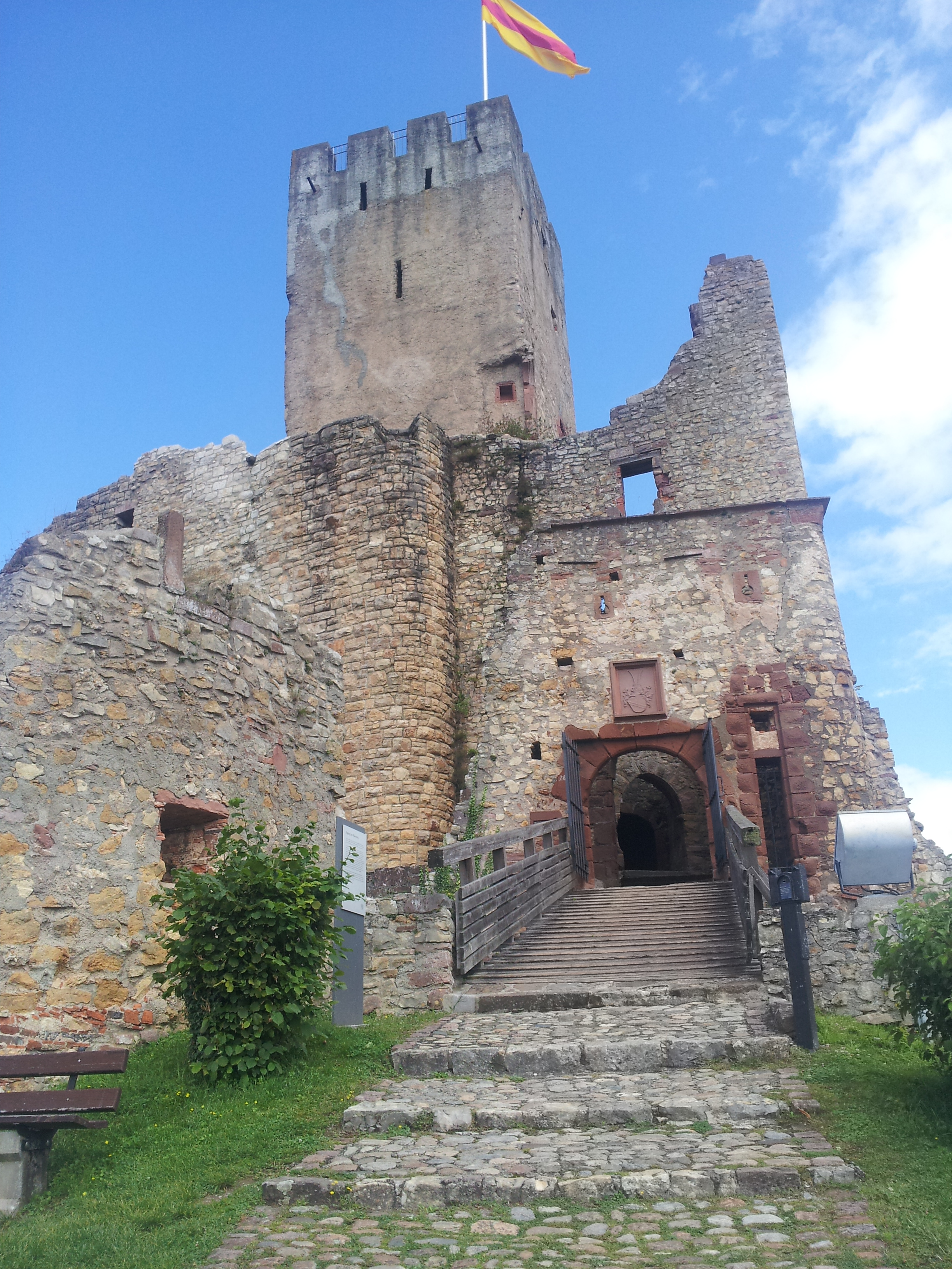 Château de Rothelin (Lörrach, Allemagne)